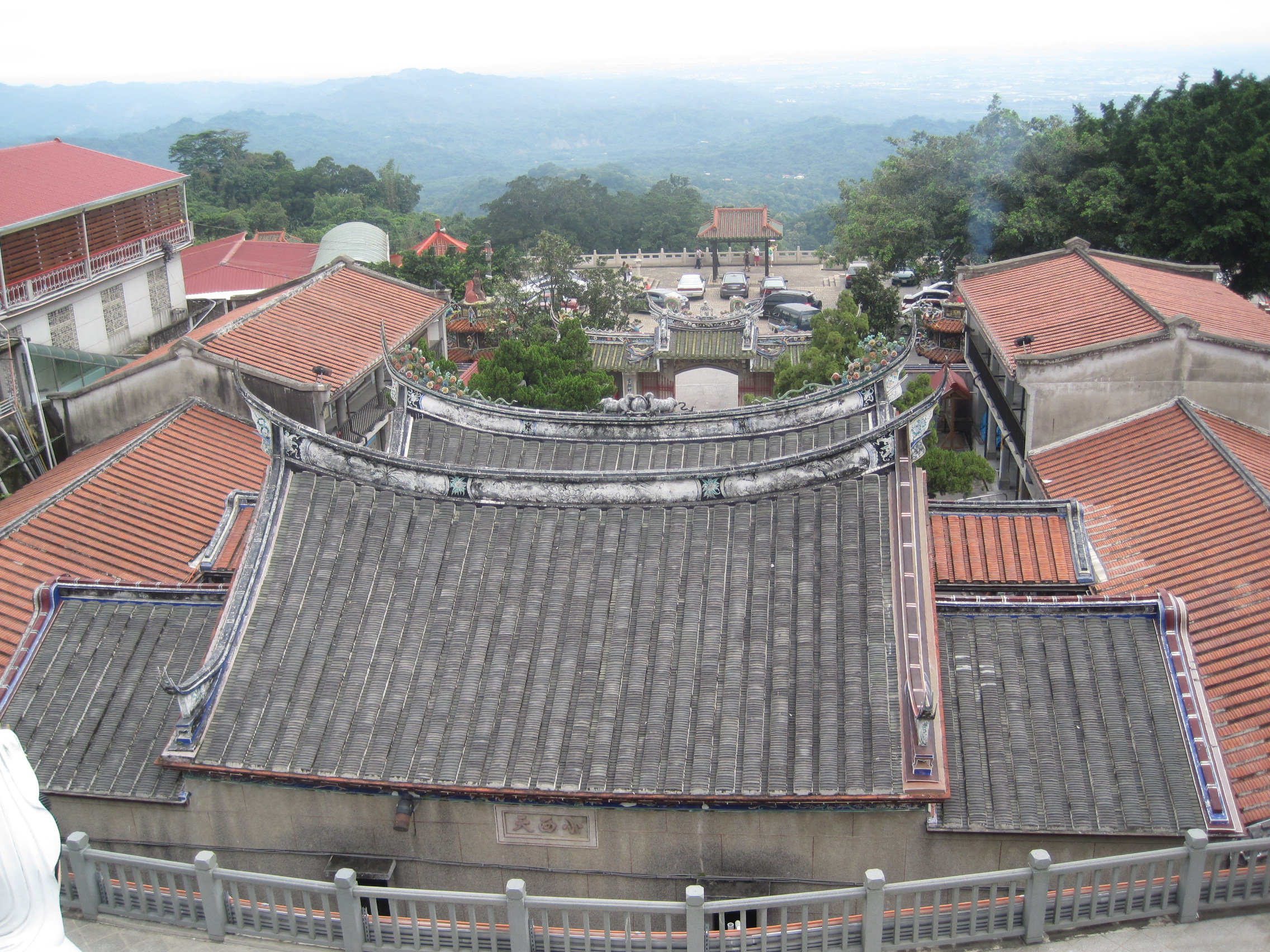 自高處拍攝的火山碧雲寺